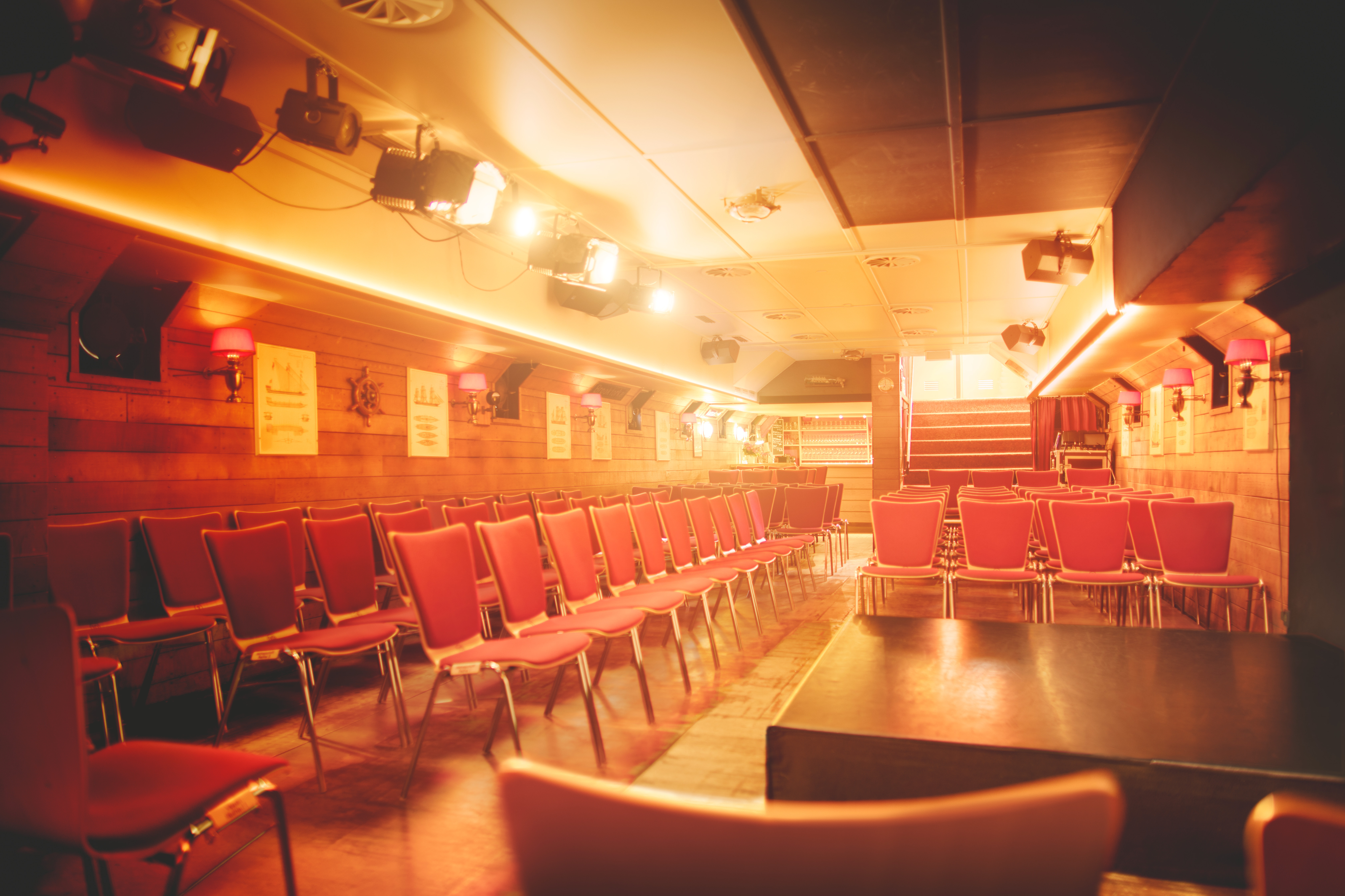 Theaterschiff Hamburg - Nikolaiflett Copyright: Heribert Schindler / Theaterschiff